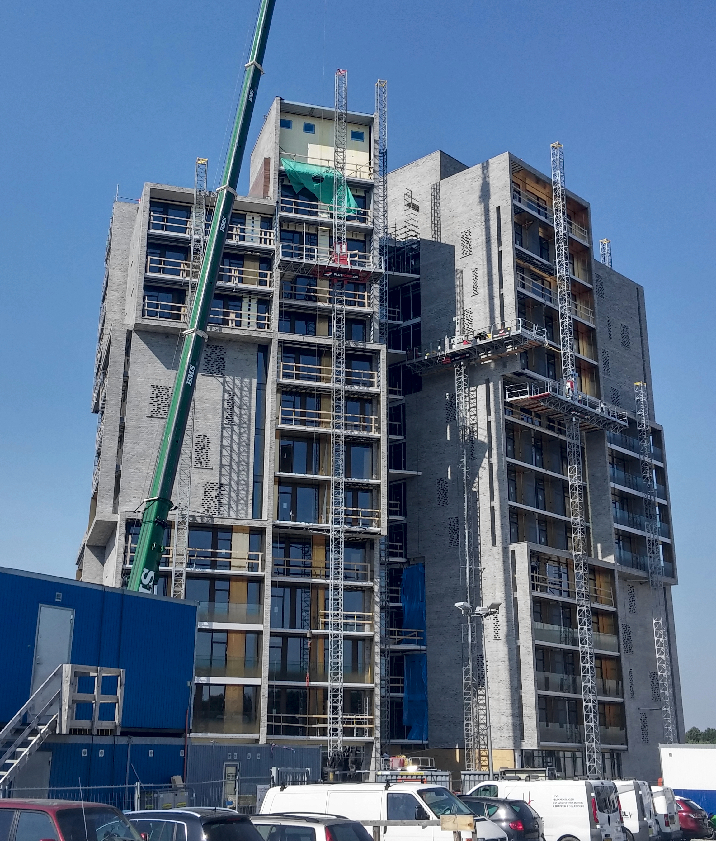 Campus Kollegiet under opførelse d. 21. aug. 2015